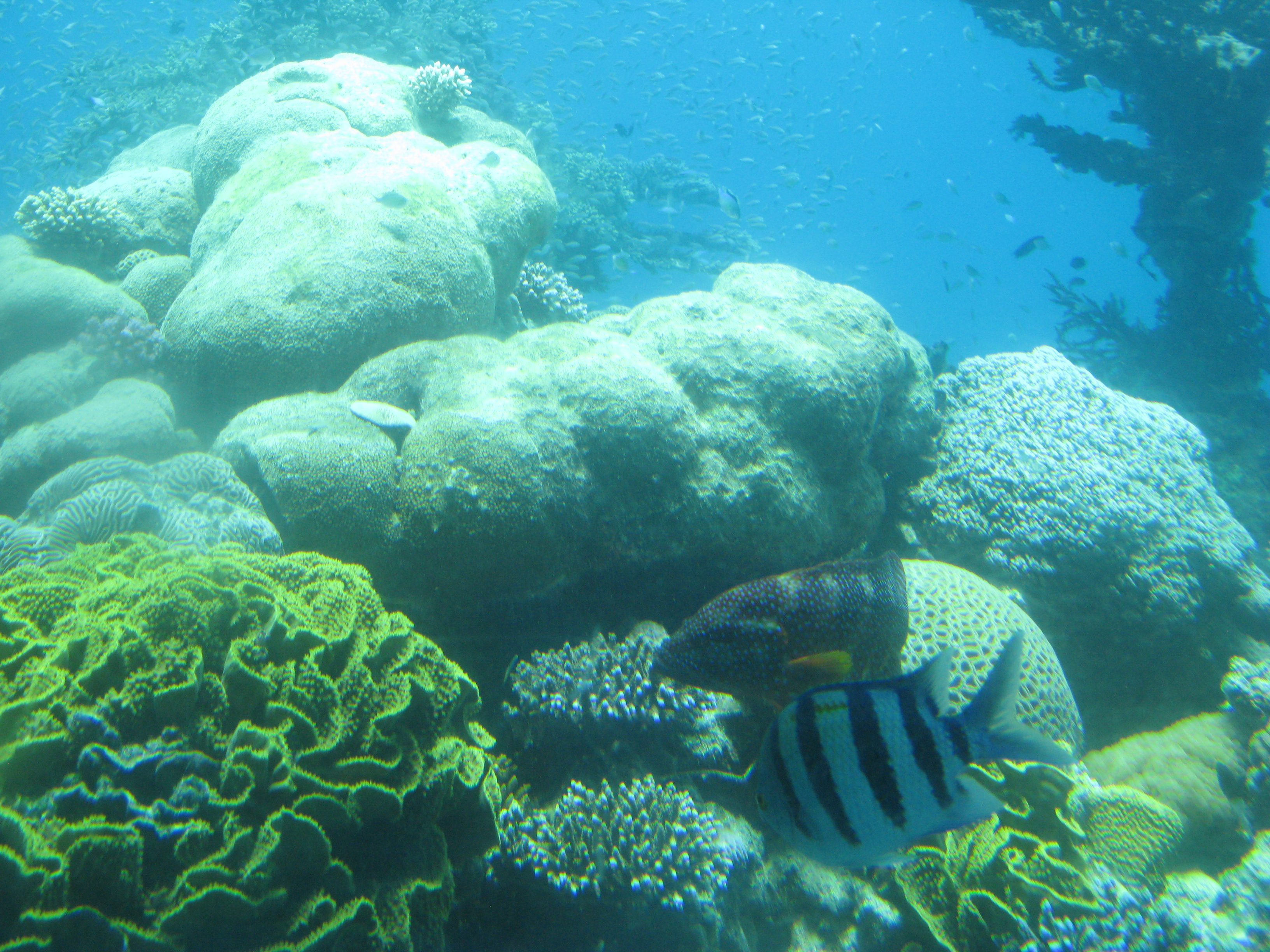 Eilat (30) Eilat